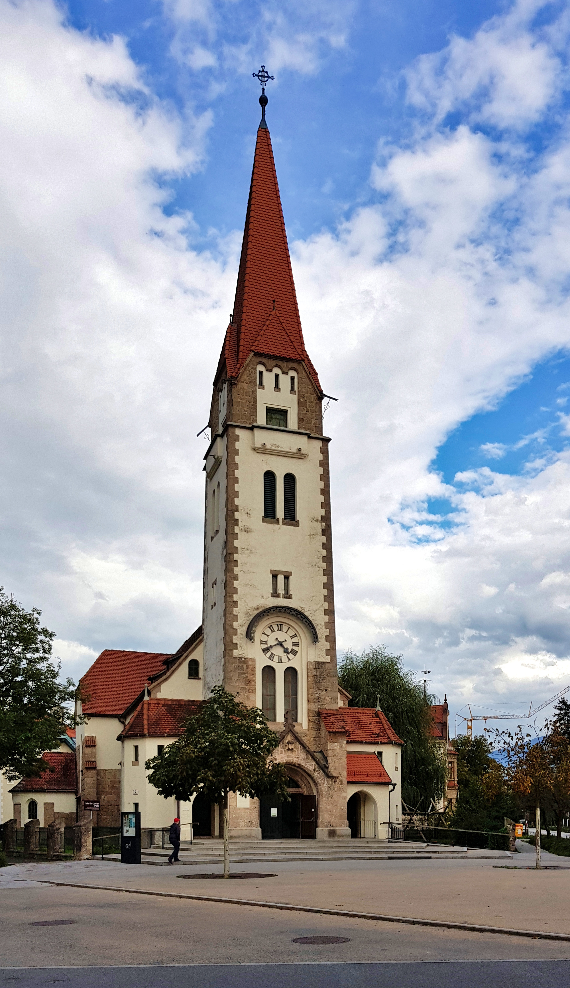 Evang. Pfarrkirche A.B. Christuskirche This media shows the remarkable cultural object in the Austrian state of Tyrol listed by the Tyrolean Art Cadastre with the ID 37410. (on tirisMaps, pdf, more images on Commons, Wikidata)